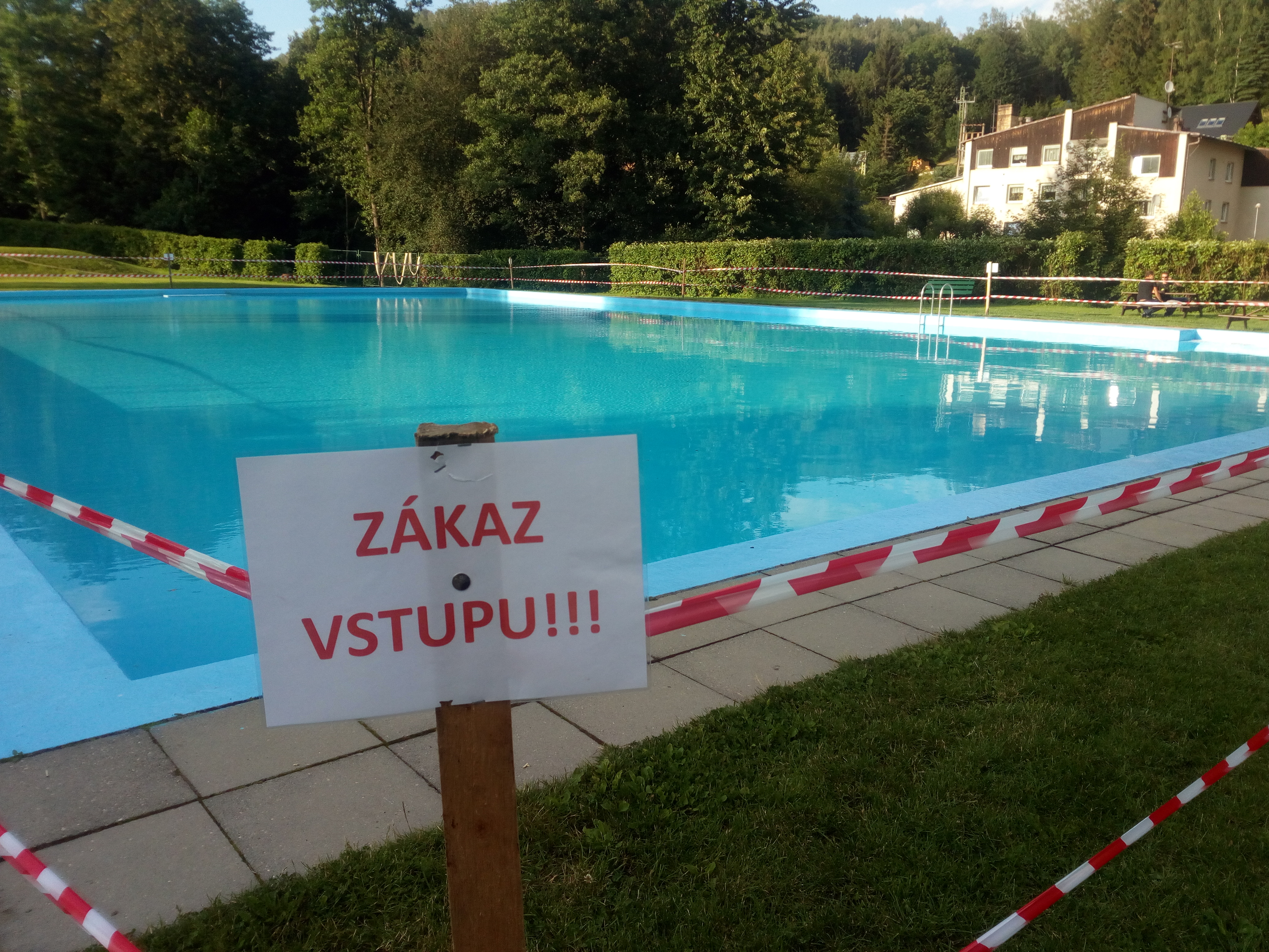 Zavřený bazén ve Zlaté Olešnici